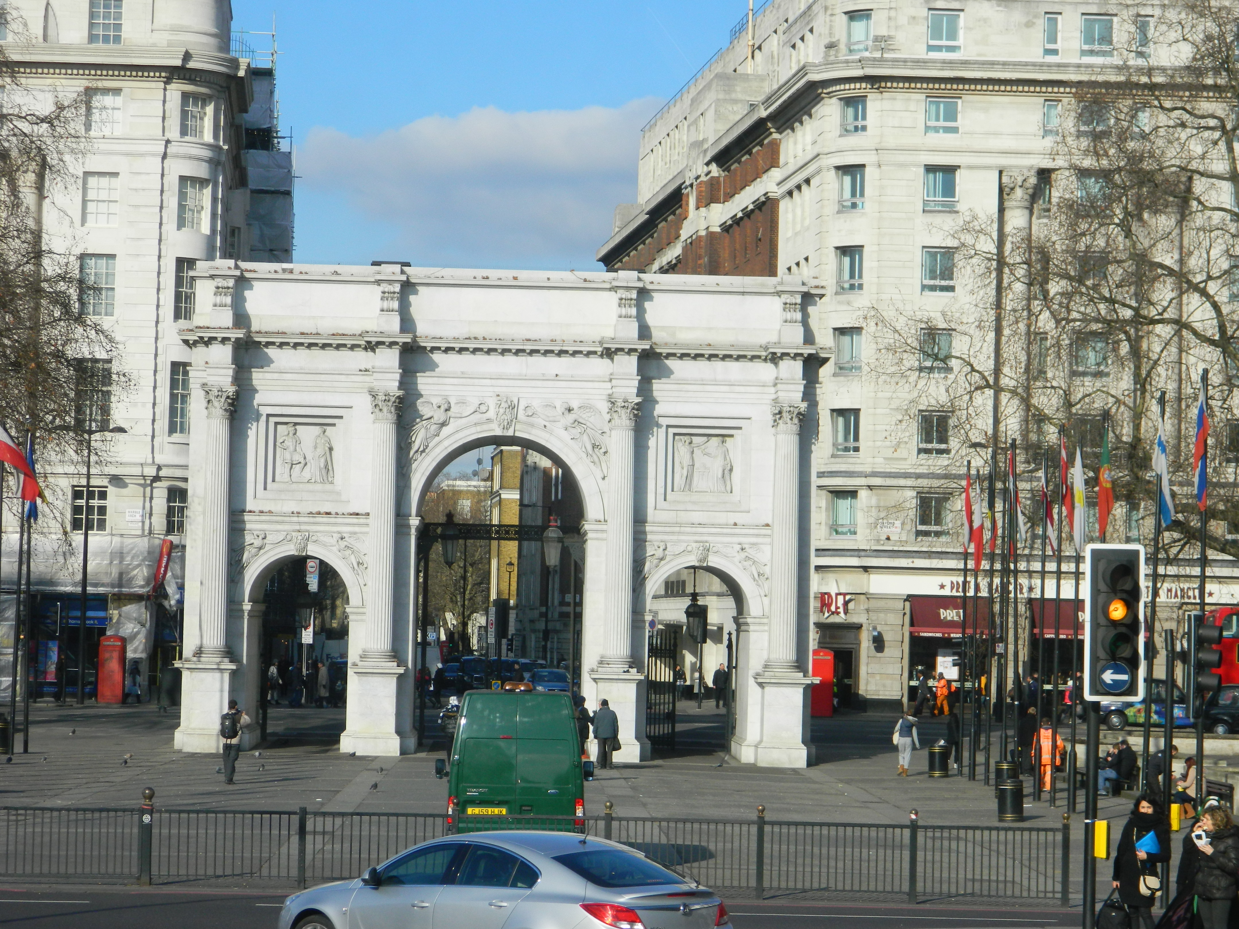 London